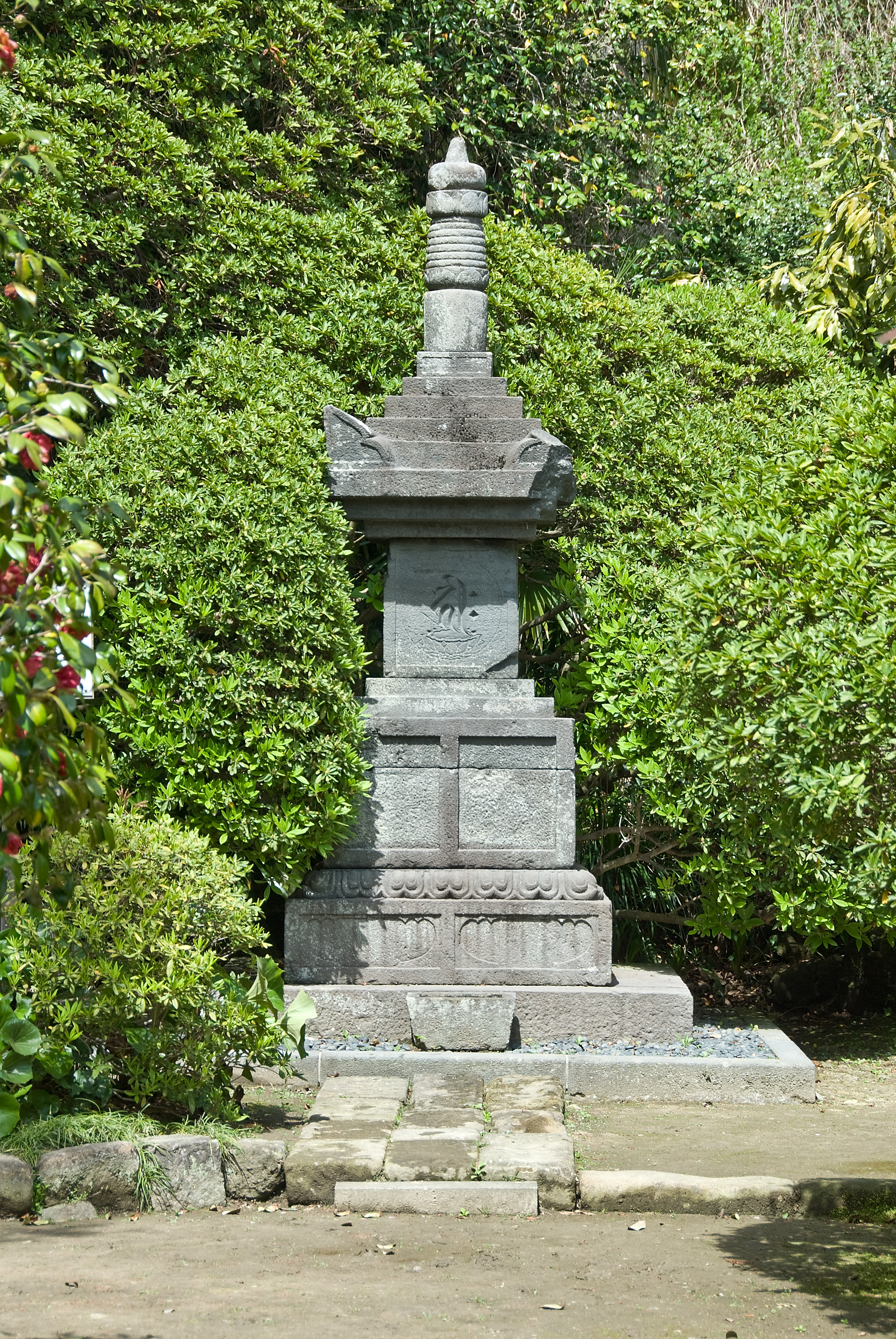 A Hōkyōin-tō at An'yō-in in Kamakura, Japan, Kamakura, Japan